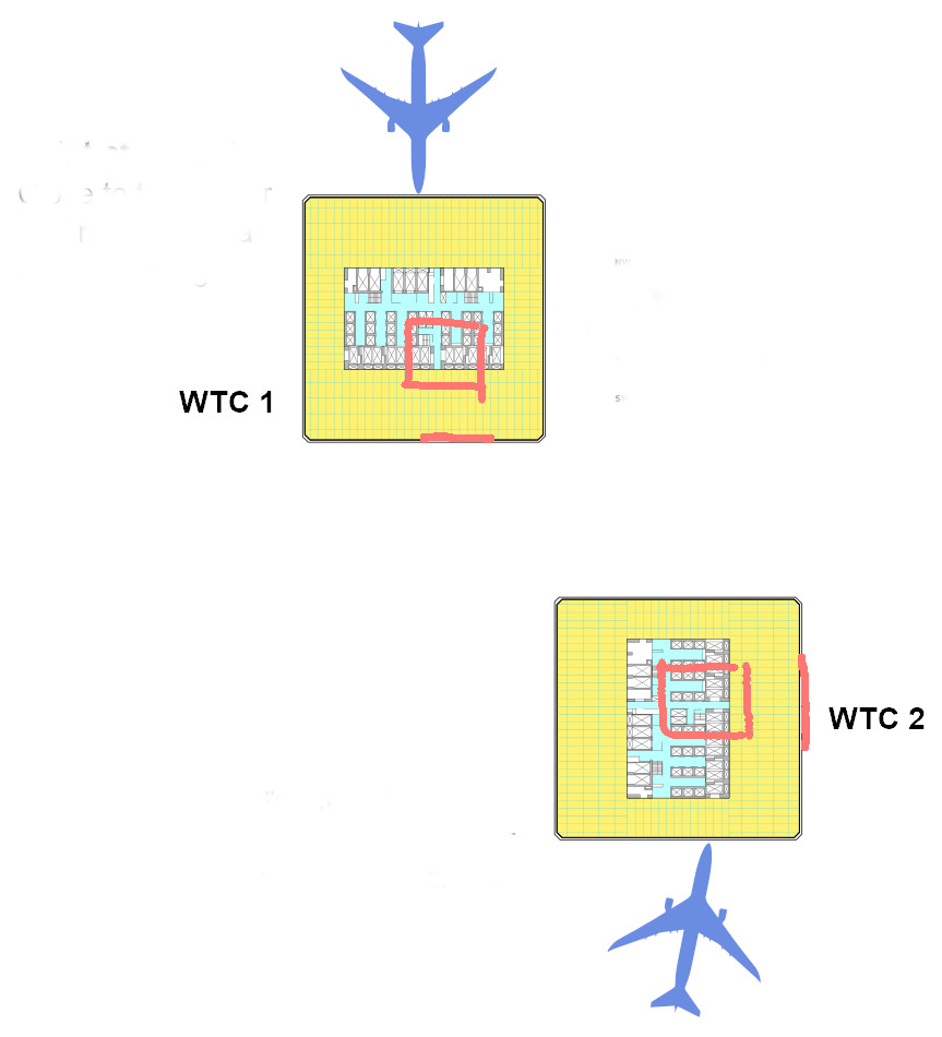 údajné umisteni nalozi ve WTC, based on File:World Trade Center 9-11 Attacks Illustration with Bird's-eye Impact Locations.svg